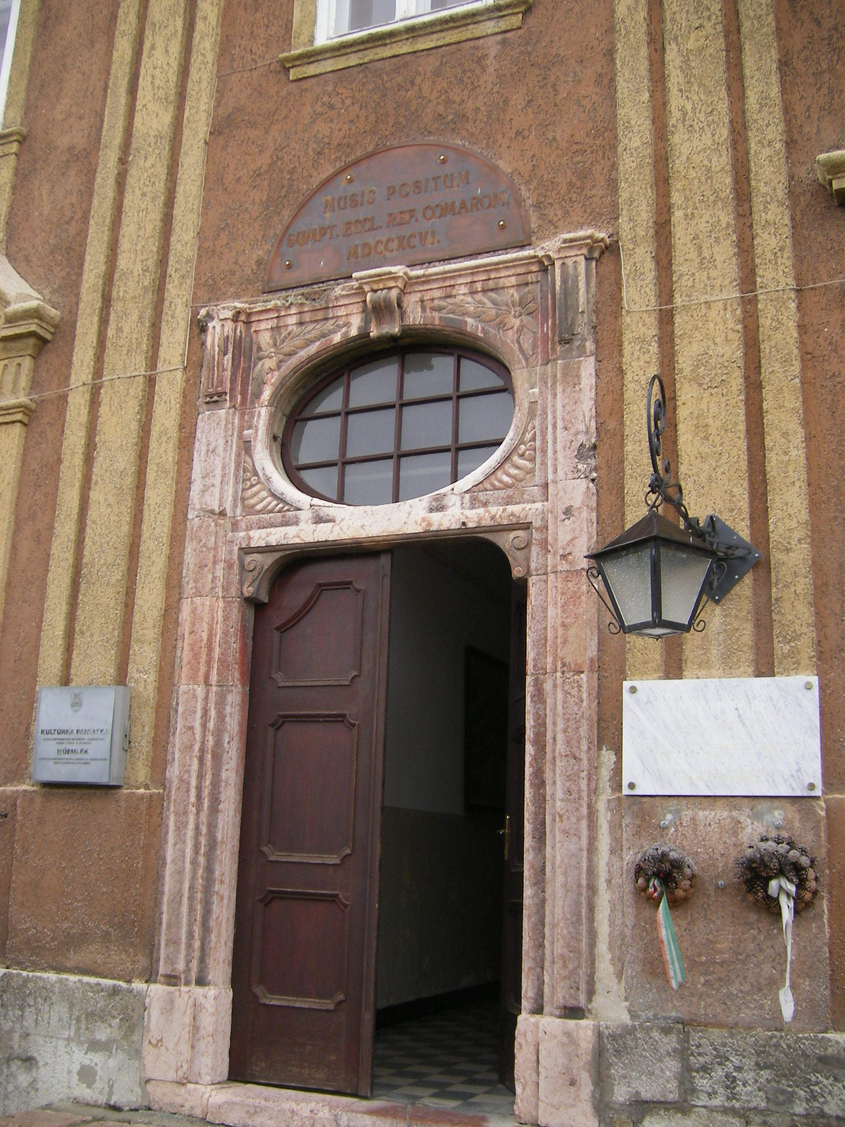 Komárom - a Református Kollégium kapuja 1796-ból